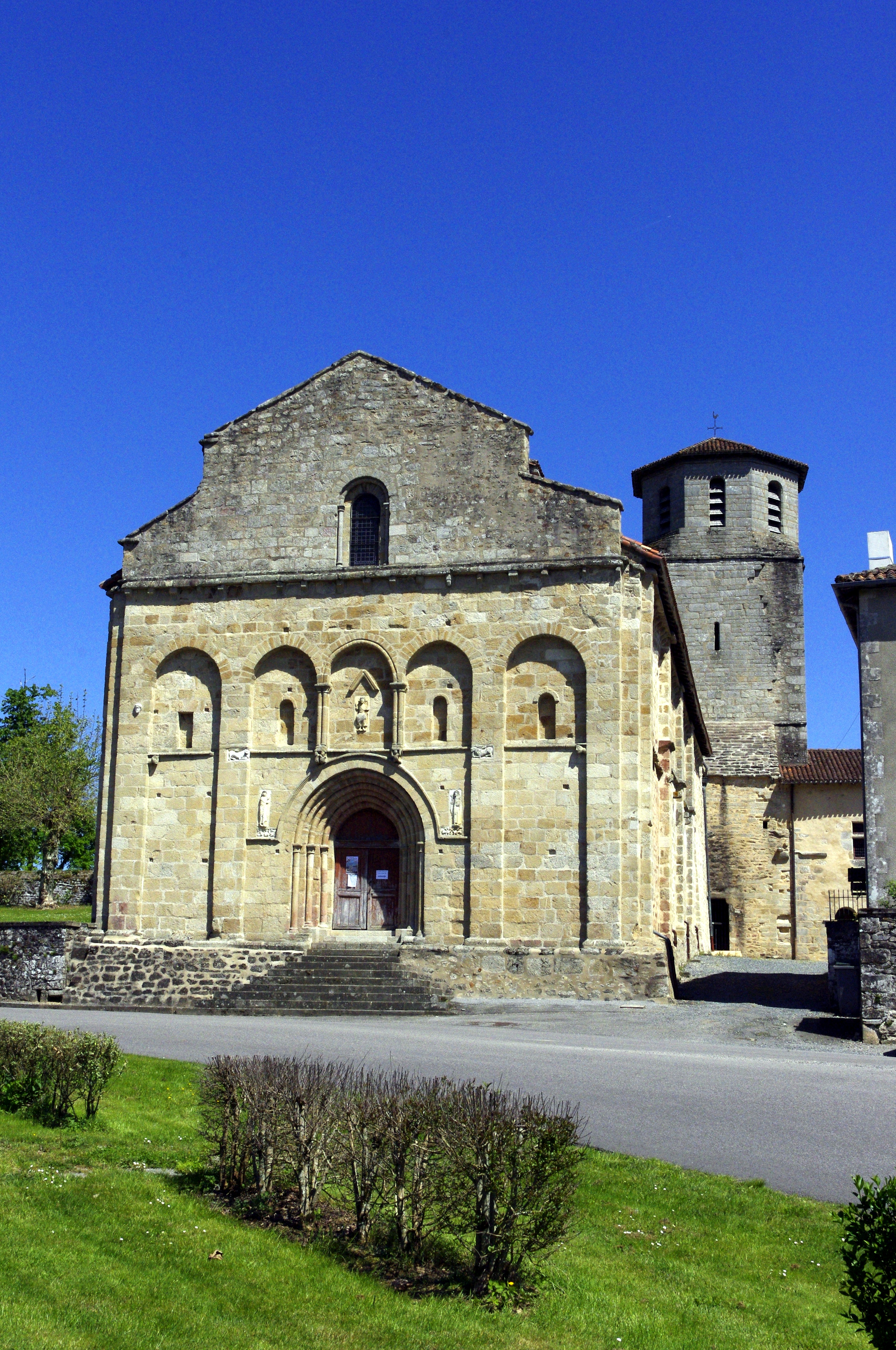 Les Salles-Lavauguyon, l'église Saint Eutrope ≈XIIe siècle.